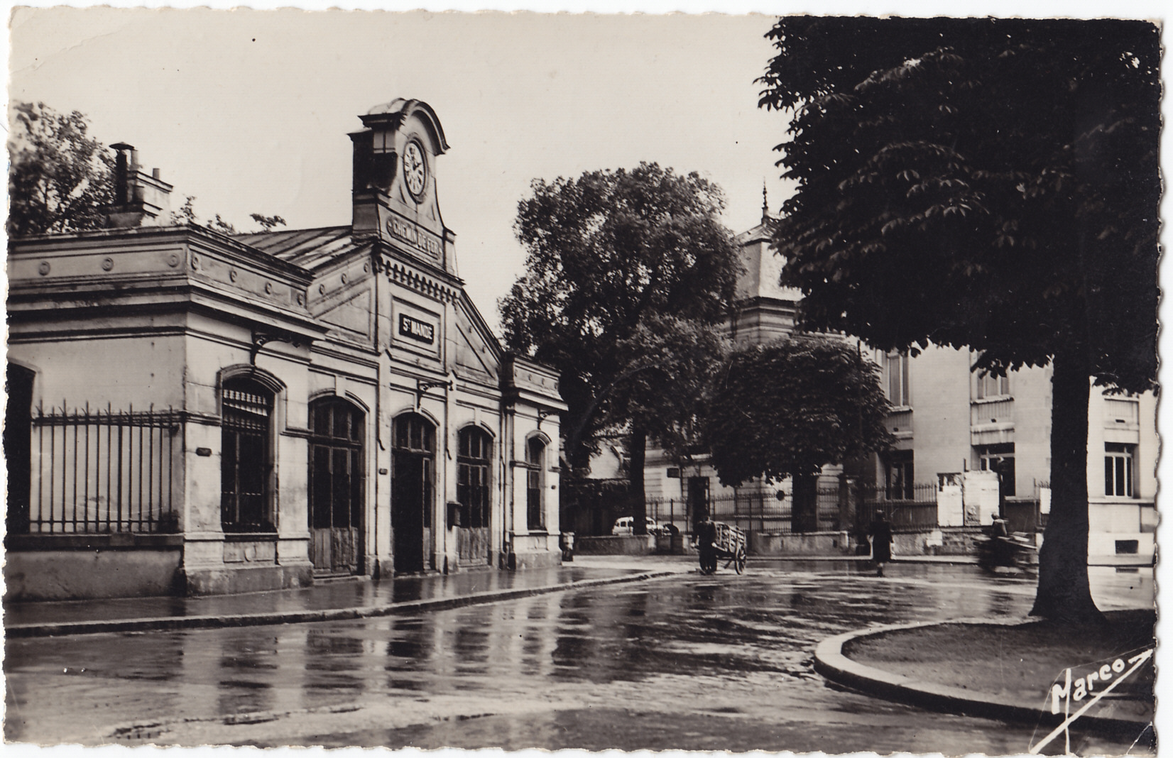 Carte postale ancienne éditée par Marco :SAINT-MANDÉ - La Gare